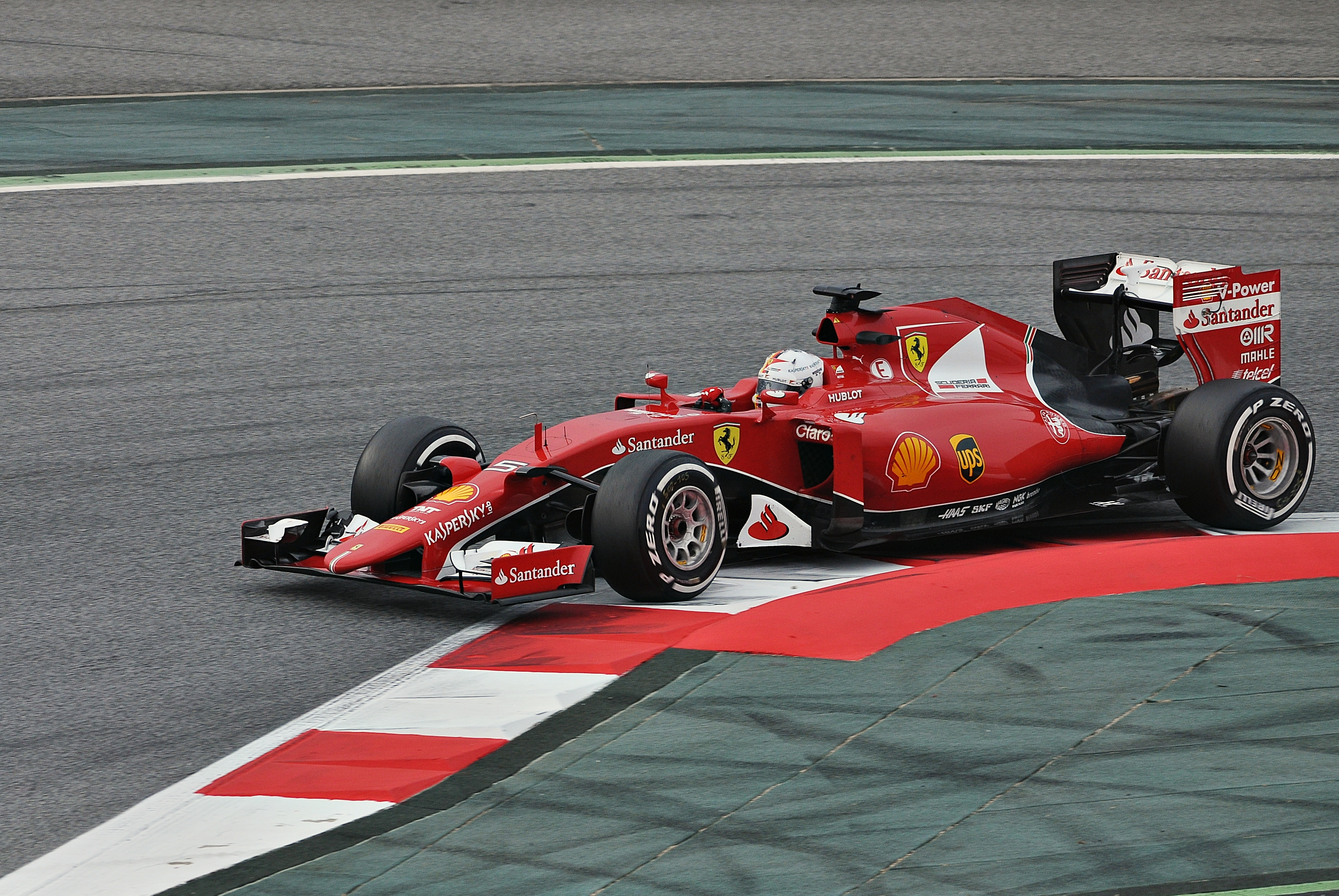 Test days Barcelona 2015